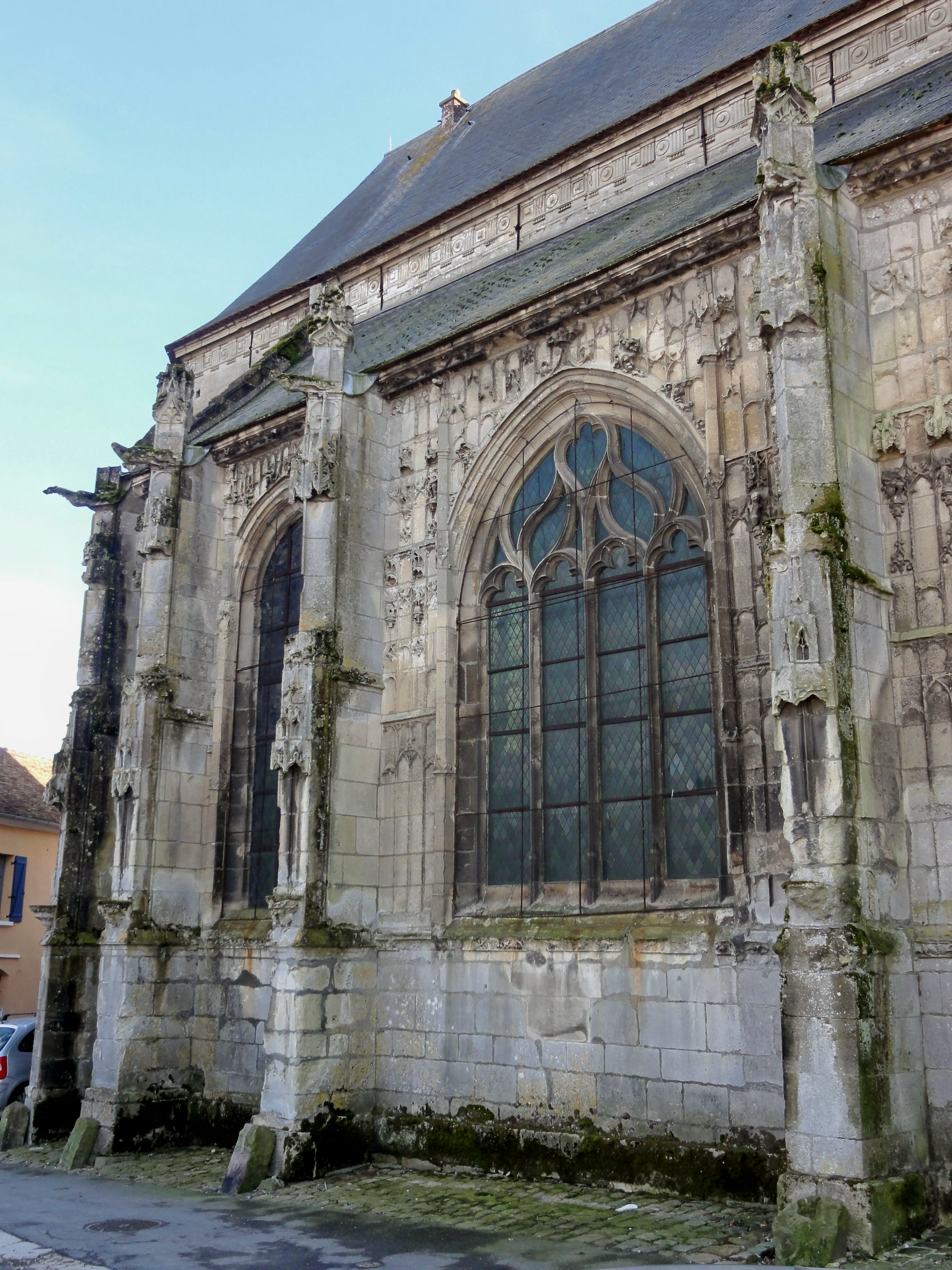 Façade de la troisième travée du bas-côté nord (à dr.).